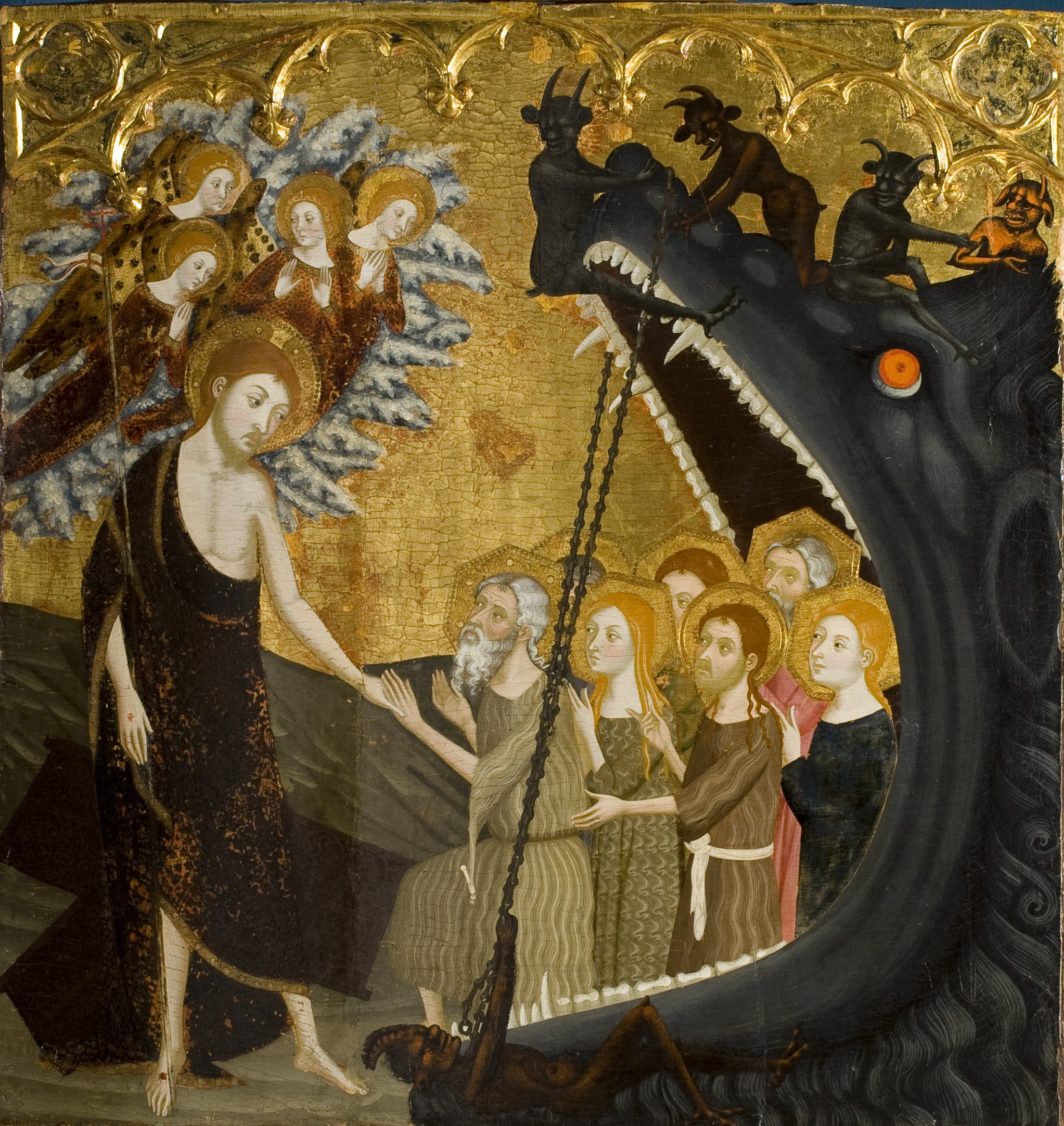 La obra representa el momento en que Jesucristo descendió a los infiernos tras su muerte en la cruz y antes de su resurrección, y forma parte del retablo que Jaume Serra pinto entre 1361 y 1362 con destino a la capilla que fray Martin de Alpartir poseía en el monasterio del Santo Sepulcro de Zaragoza.